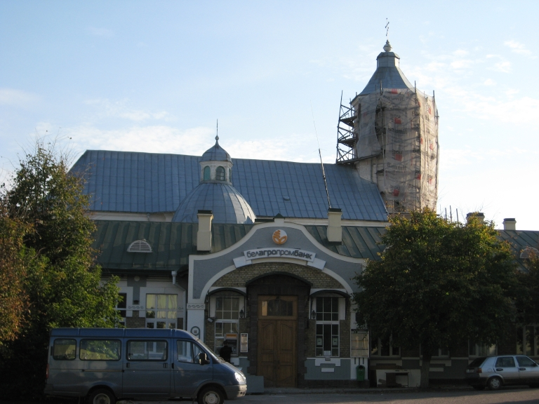 Слонім. Банк і царква